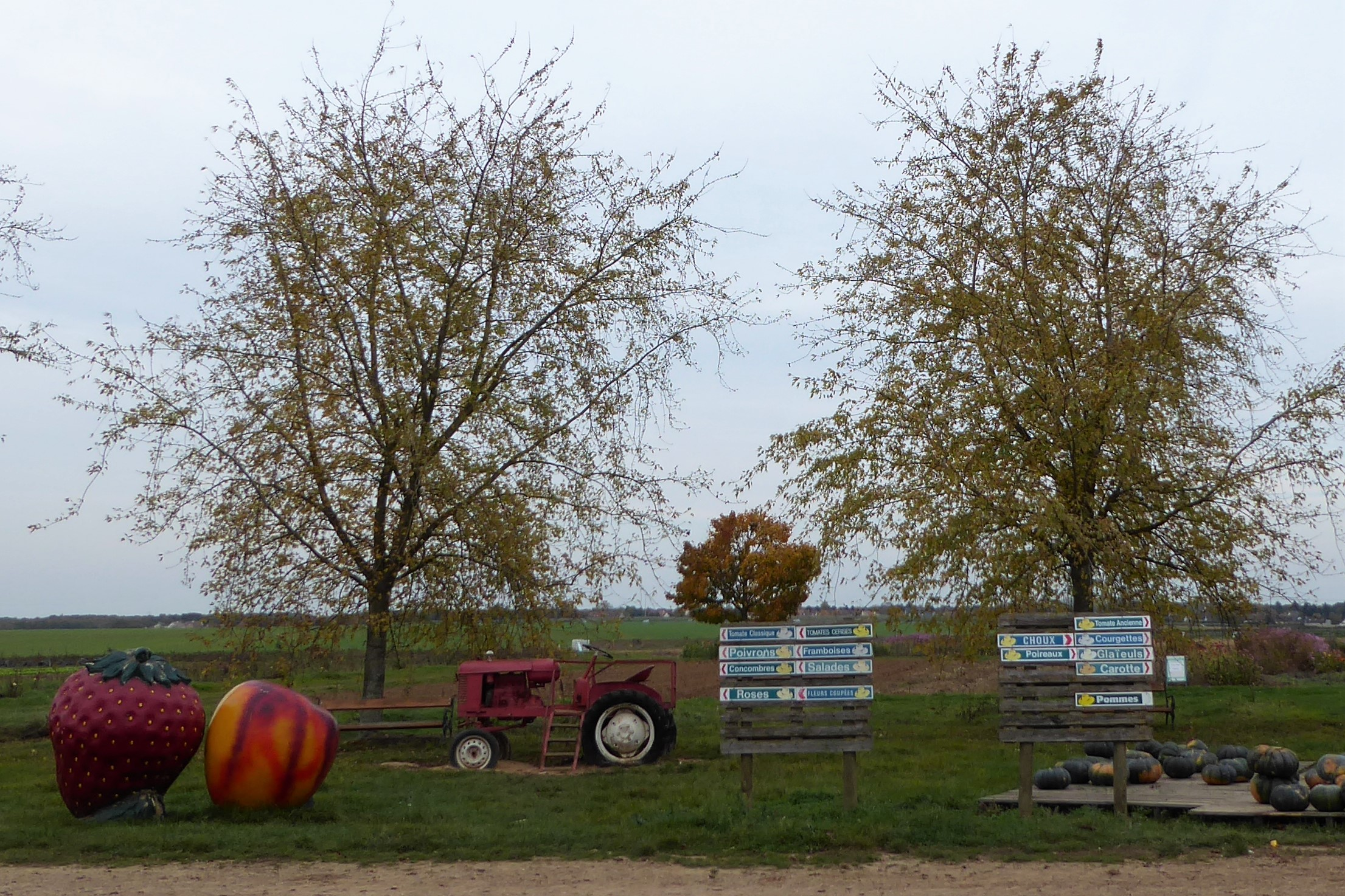 "Cueillette de Seresville", Mainvilliers, Eure-et-Loir, France.